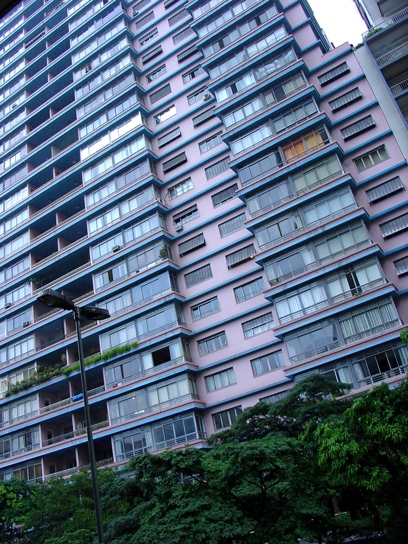 Edicífio Louvre - Projeto de João Artacho Jurado